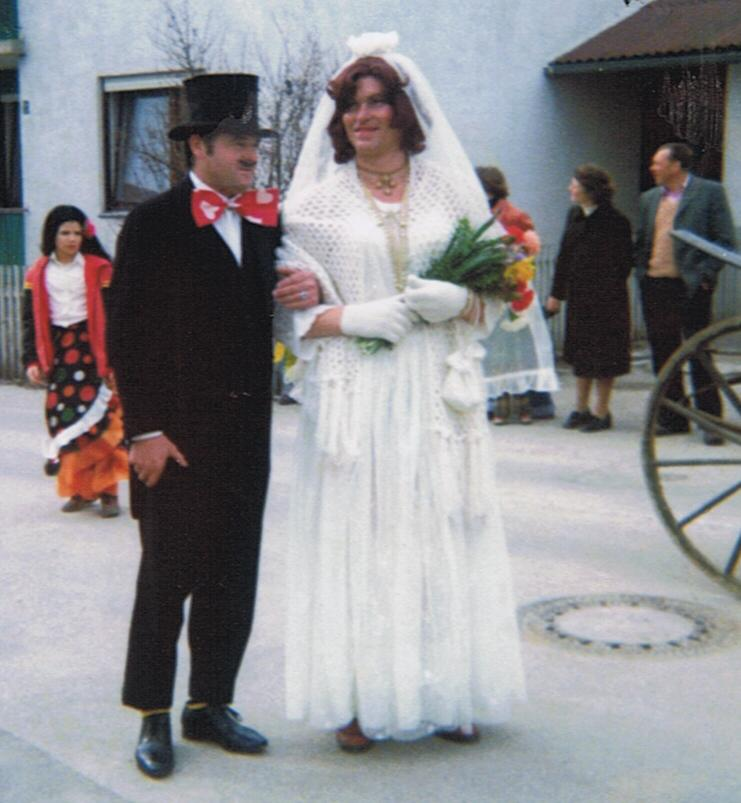 Faschingshochzeit; carneval wedding